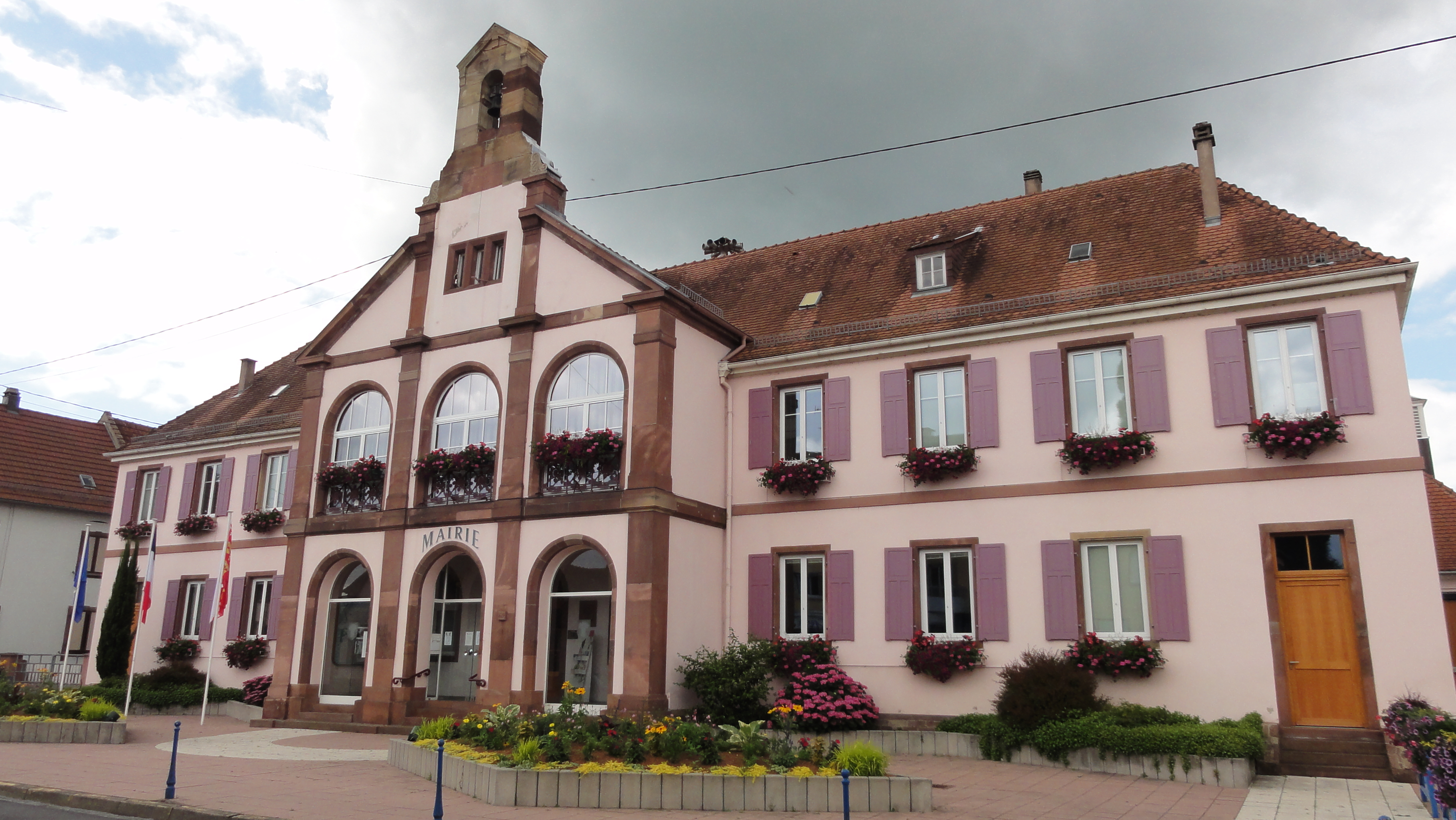 Alsace, Bas-Rhin, Eschau, Mairie.